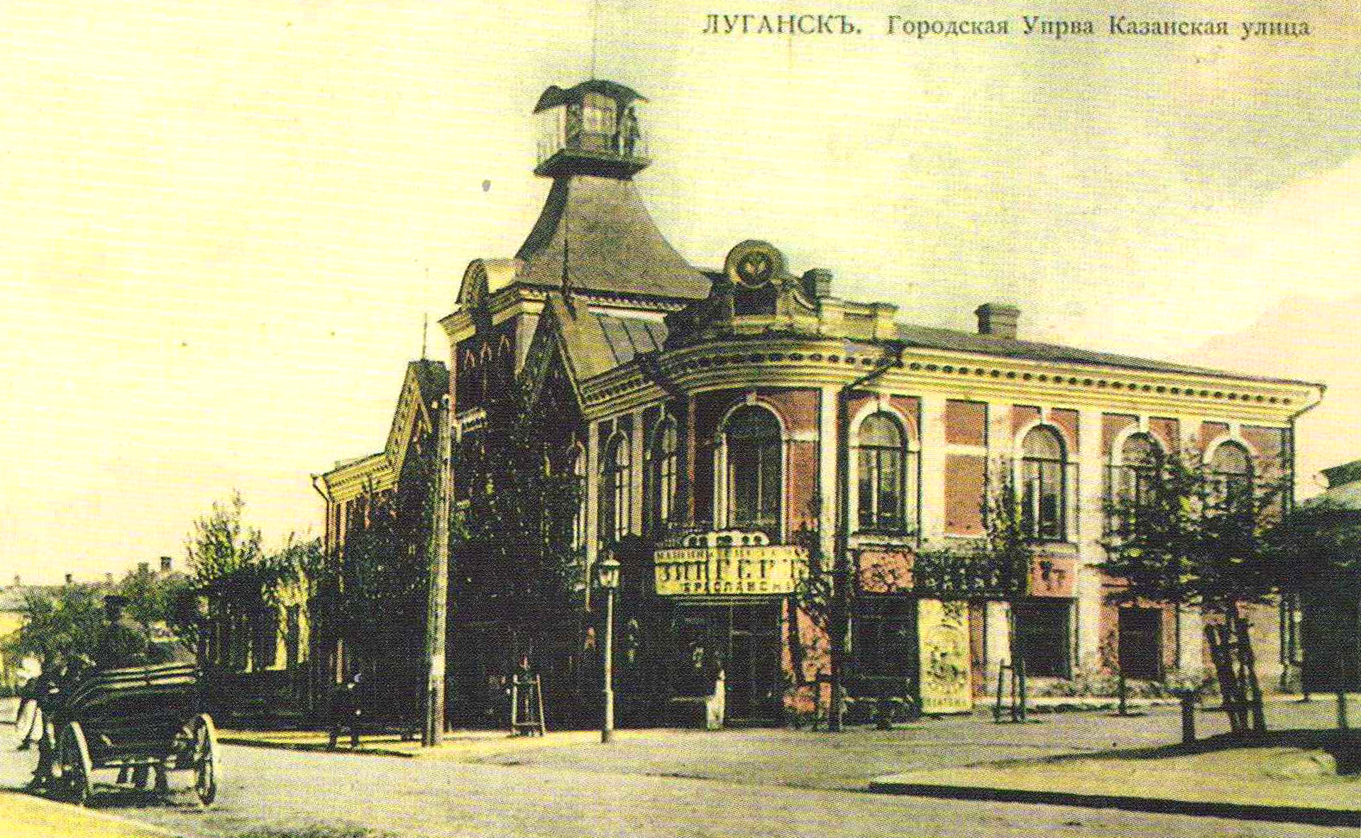 Міська управа.Вул.Казанська (Карла Маркса). Луганськ